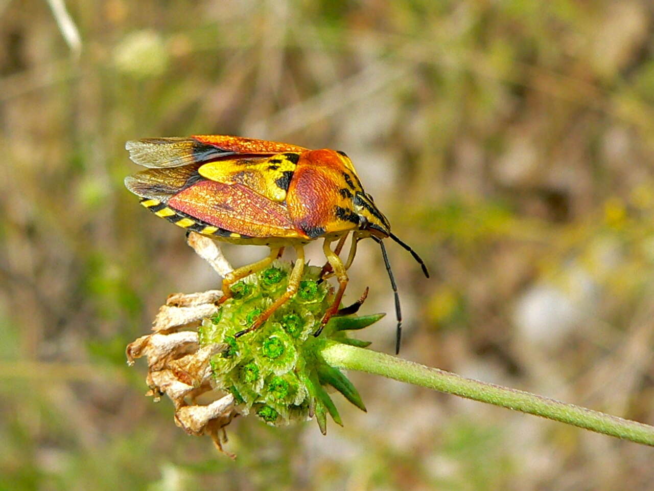 Saint-Vallier-de-Thiey, Alpes-Maritimes, FRANCE (Carpocoris mediterraneus)